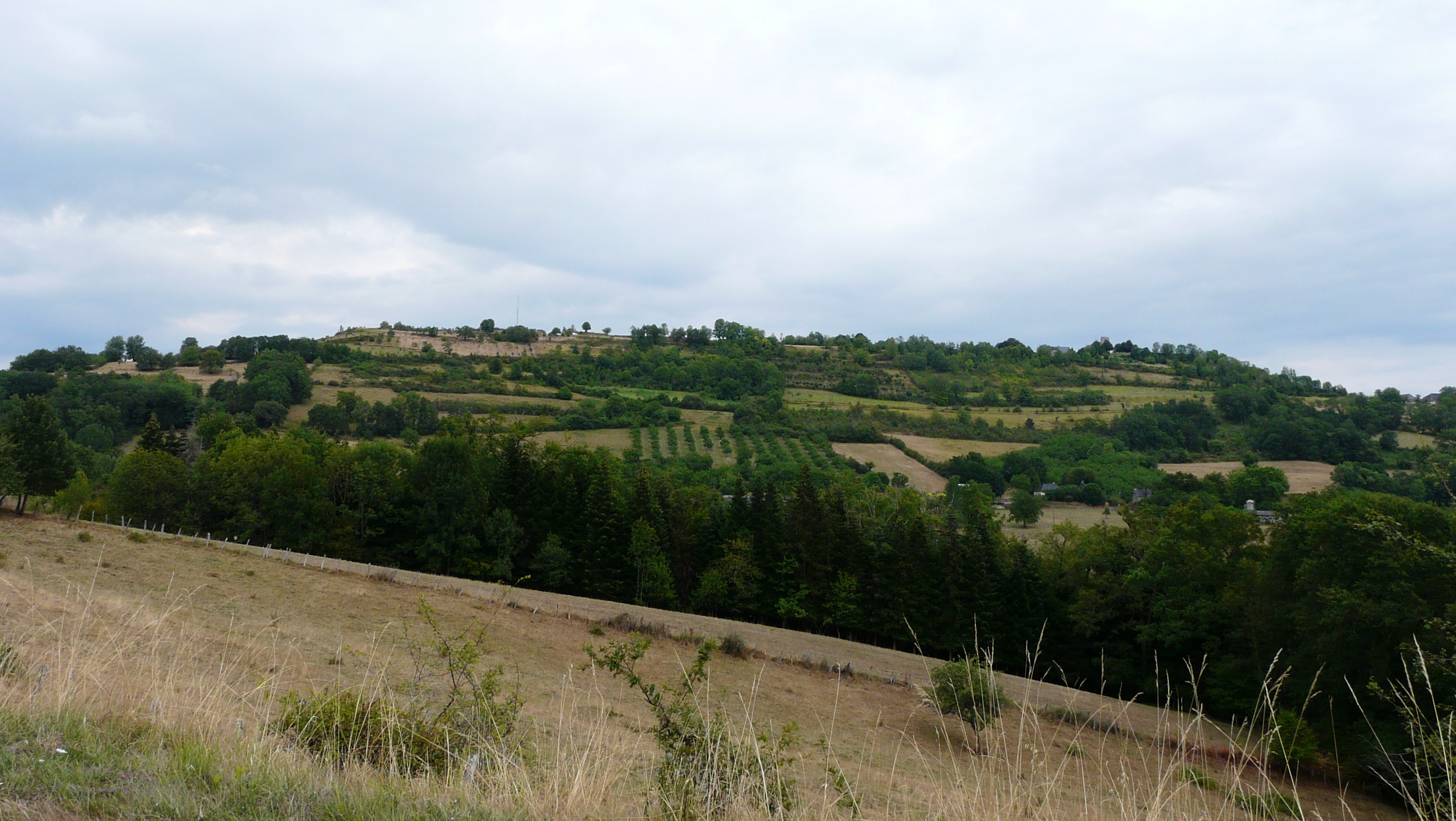 Le puy d'Yssandon vu depuis l'est (route départementale 3), Corrèze, France.